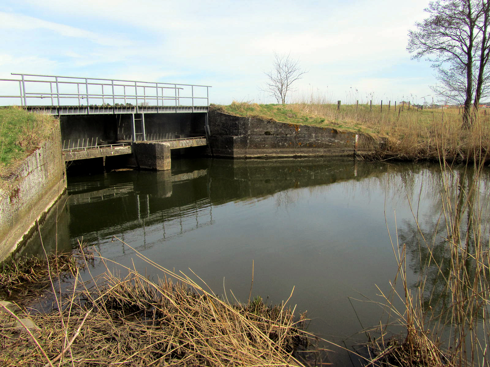 Rands Fjord stemmeværk og dæmning set fra nord